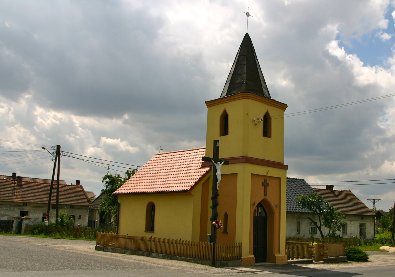 Pogórze (dodatkowa nazwa w j. niem. Pogosch) – wieś w Polsce położona w województwie opolskim, w powiecie prudnickim, w gminie Biała.